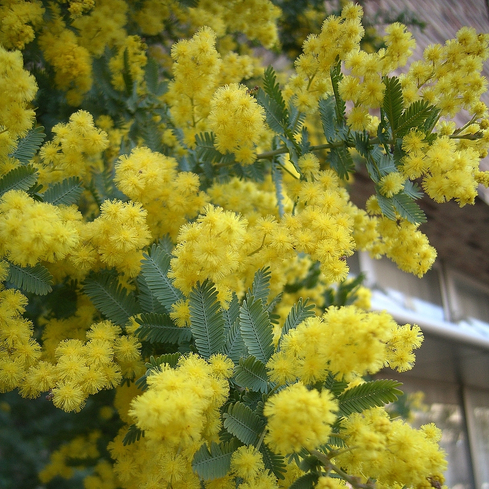 ギンヨウアカシア Acacia baileyana 春先に木一杯に黄色い花が咲く様はとても綺麗です。 Location 神戸市長田区